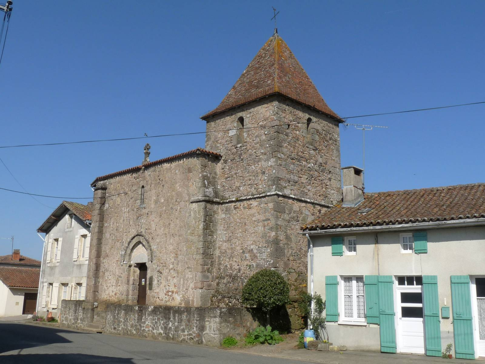 église de Grenord, Chabanais, Charente, France